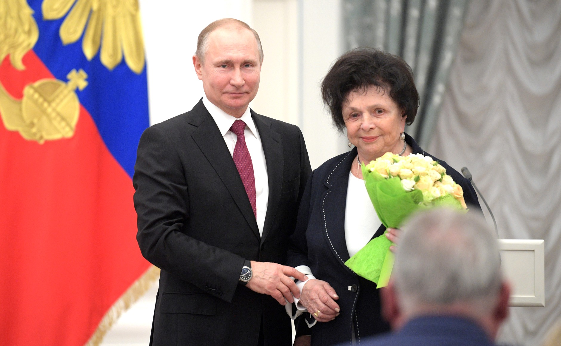 На церемонии награждения медалями «Герой Труда Российской Федерации». С профессором Российского национального исследовательского медицинского университета имени Н.И.Пирогова Галиной Савельевой.